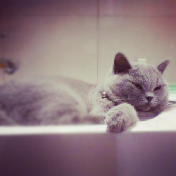 Un British Shorthair durmiendo en el fregadero.